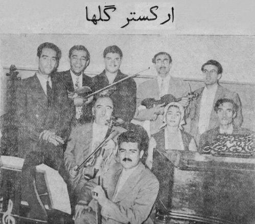 اعضای ارکستر گلها: مرتضى محجوبى، مرضيه، ابوالحسن صبا، تجويدى، عبداله جهان پناه و... در استوديو گلها - سال ۱۳۳۶